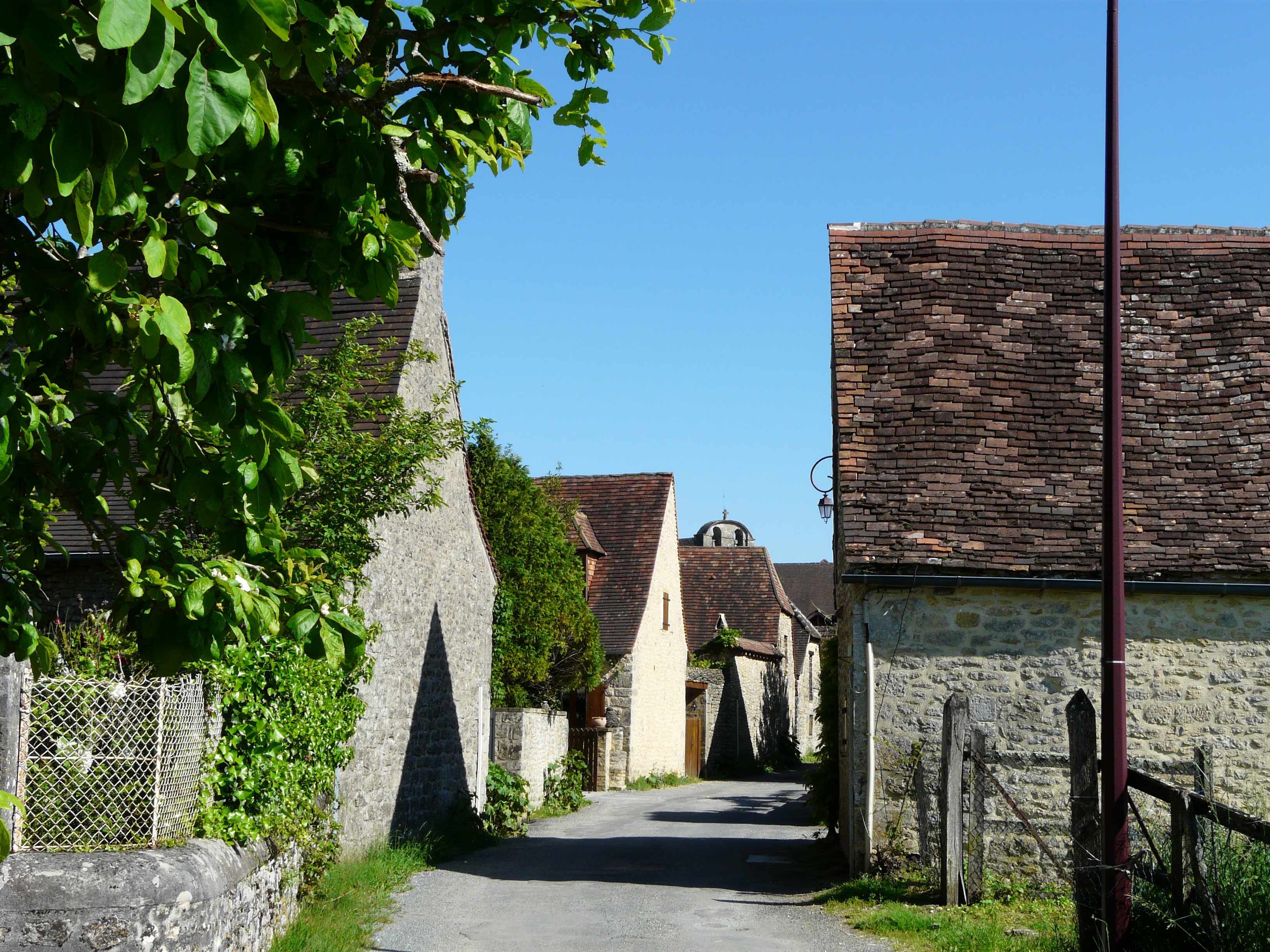 Une rue du village de Fanlac, Dordogne, France.